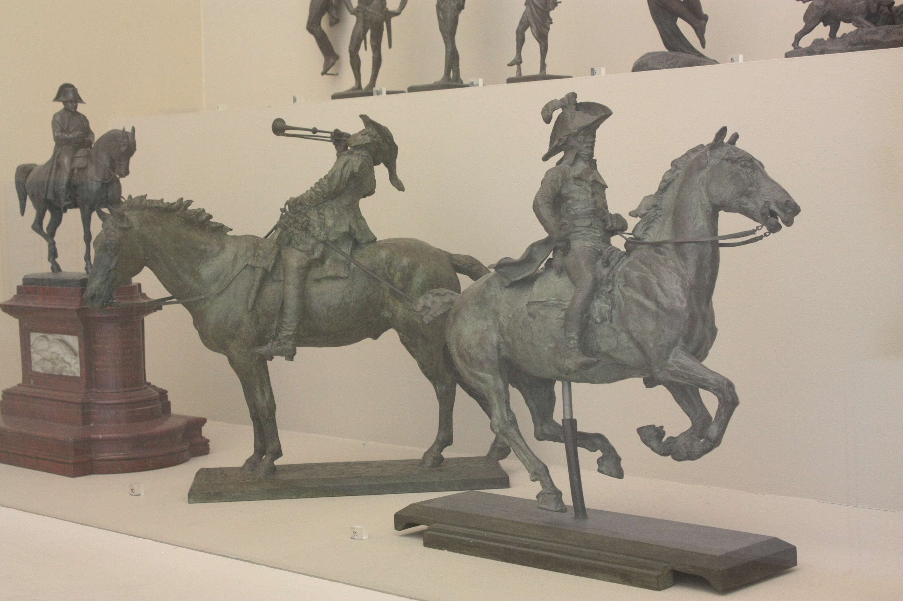 Le Général Duroc à Castiglione de 1890 (à droite) et Hérault de Murcie de 1879 (à gauche). Bronzes de Ernest Meissonier.